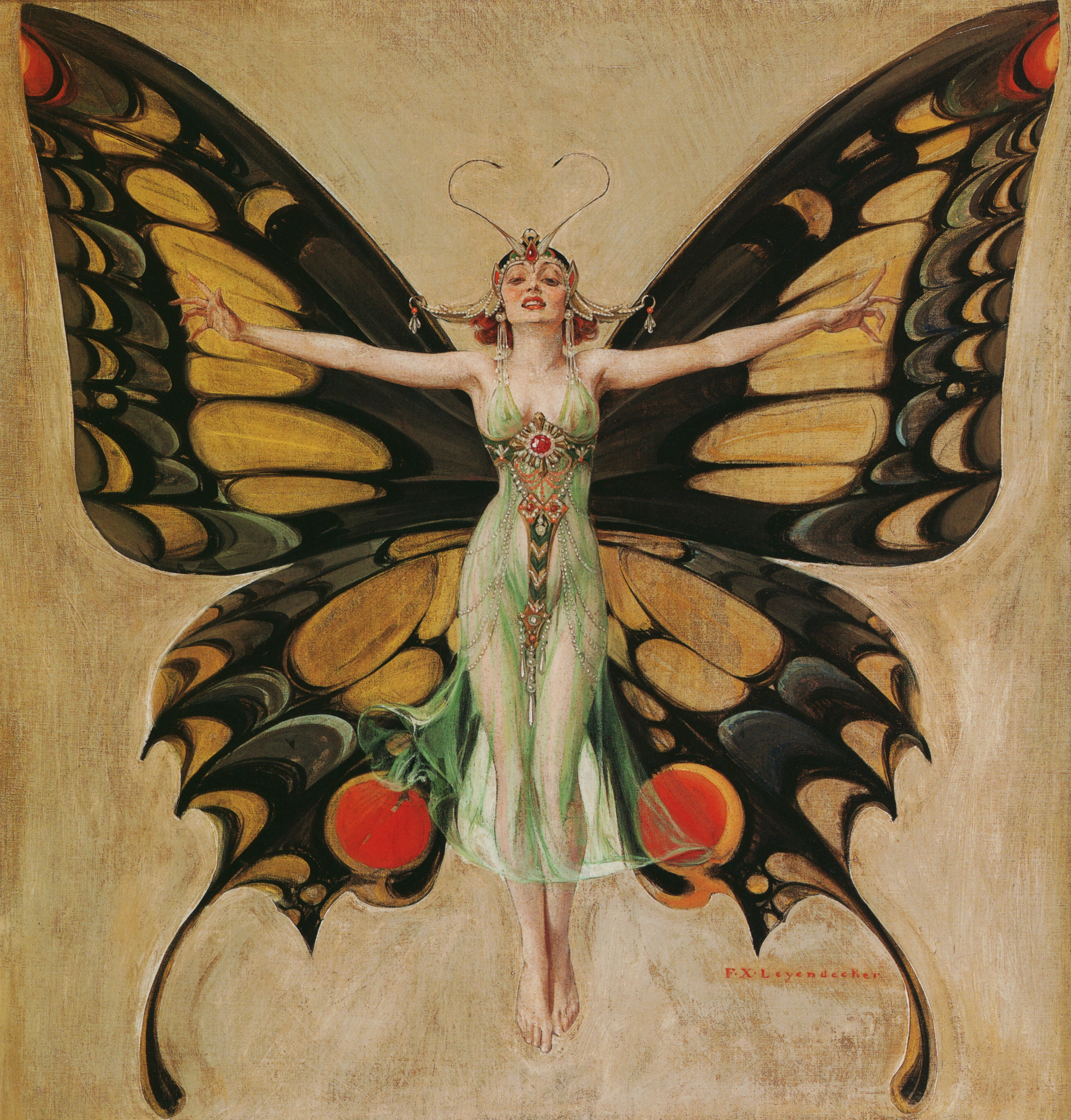 "The Flapper" by Frank Xavier Leyendecker, 1922